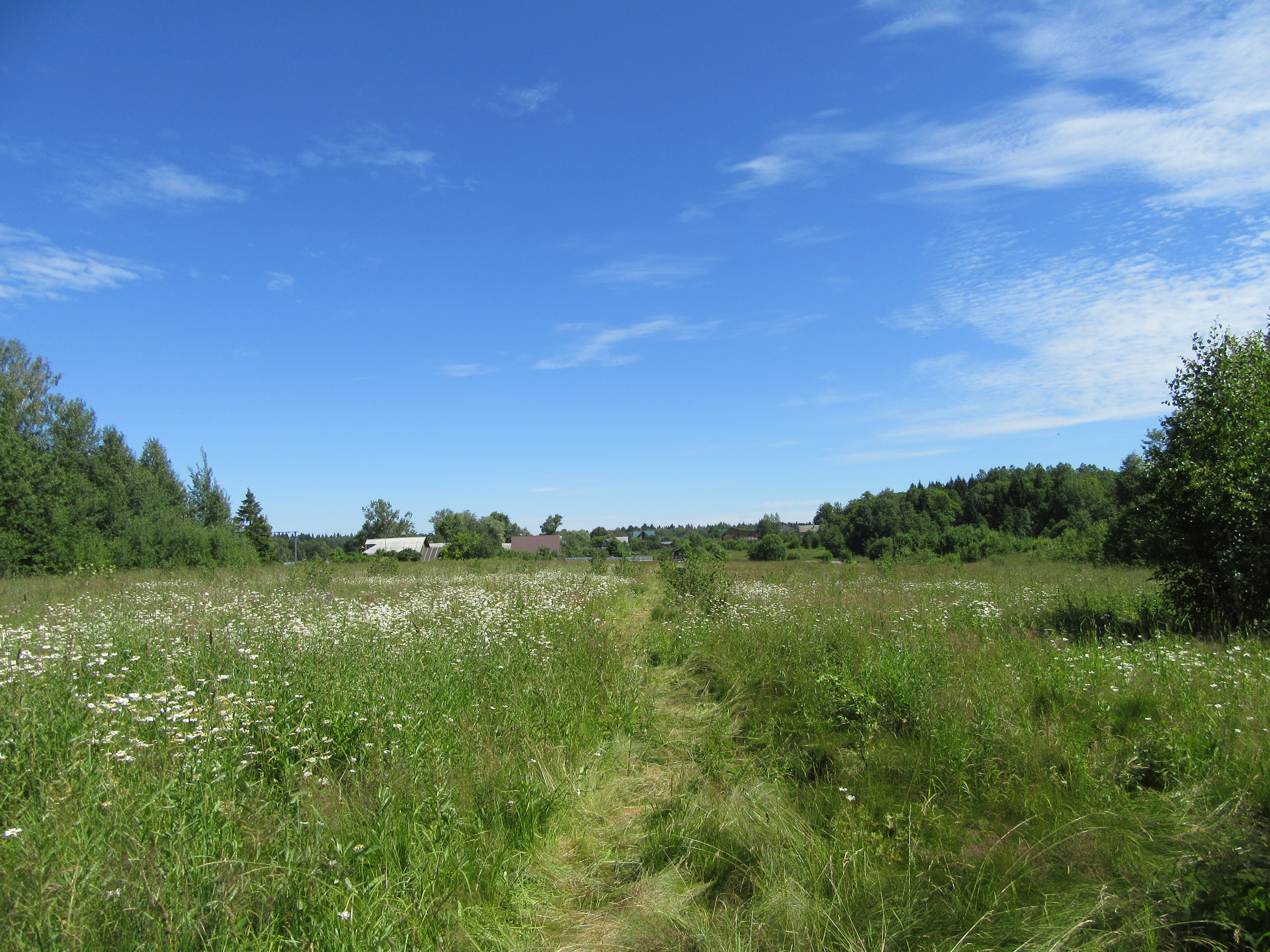 около деревни Рязанцы Сергиево-Посадского района